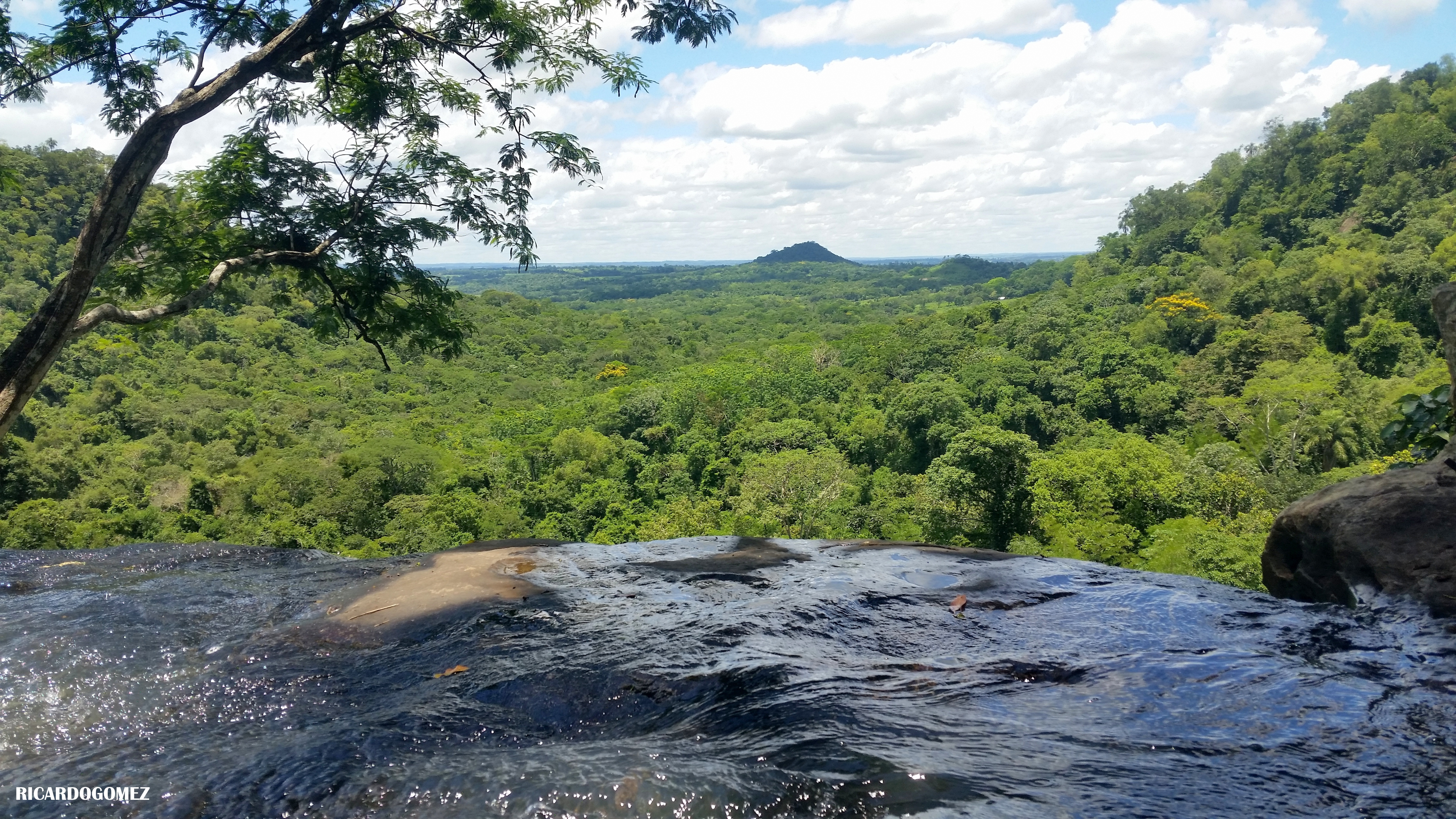 Visto desde la Cima